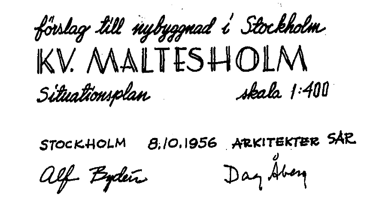 Radhusområdet Sjöträdgården, ritningsstämpel med Alf Bydéns och Dag Åbergs namnteckning